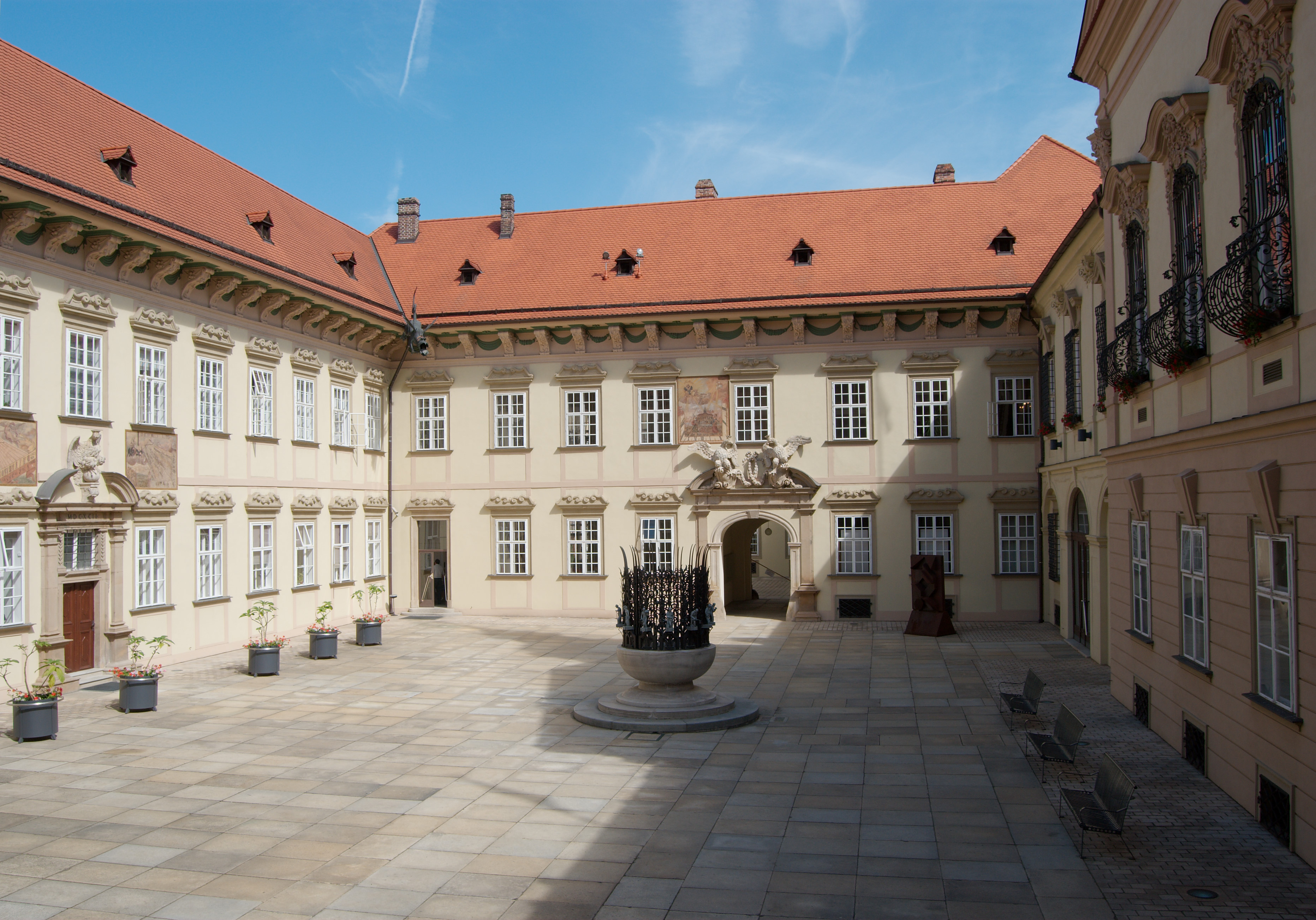 Město Brno - nádvoří Nové radnice v Brně při pohledu ze schodiště